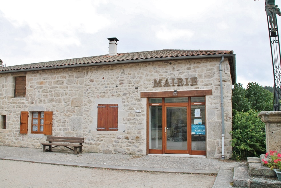 la Mairie